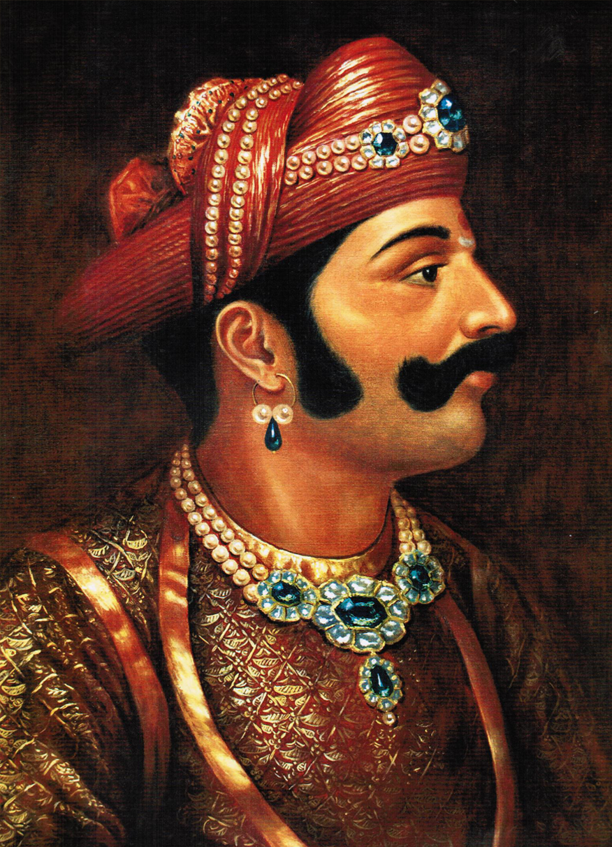 Malhar Rao Holkar, Maharaja of Indore